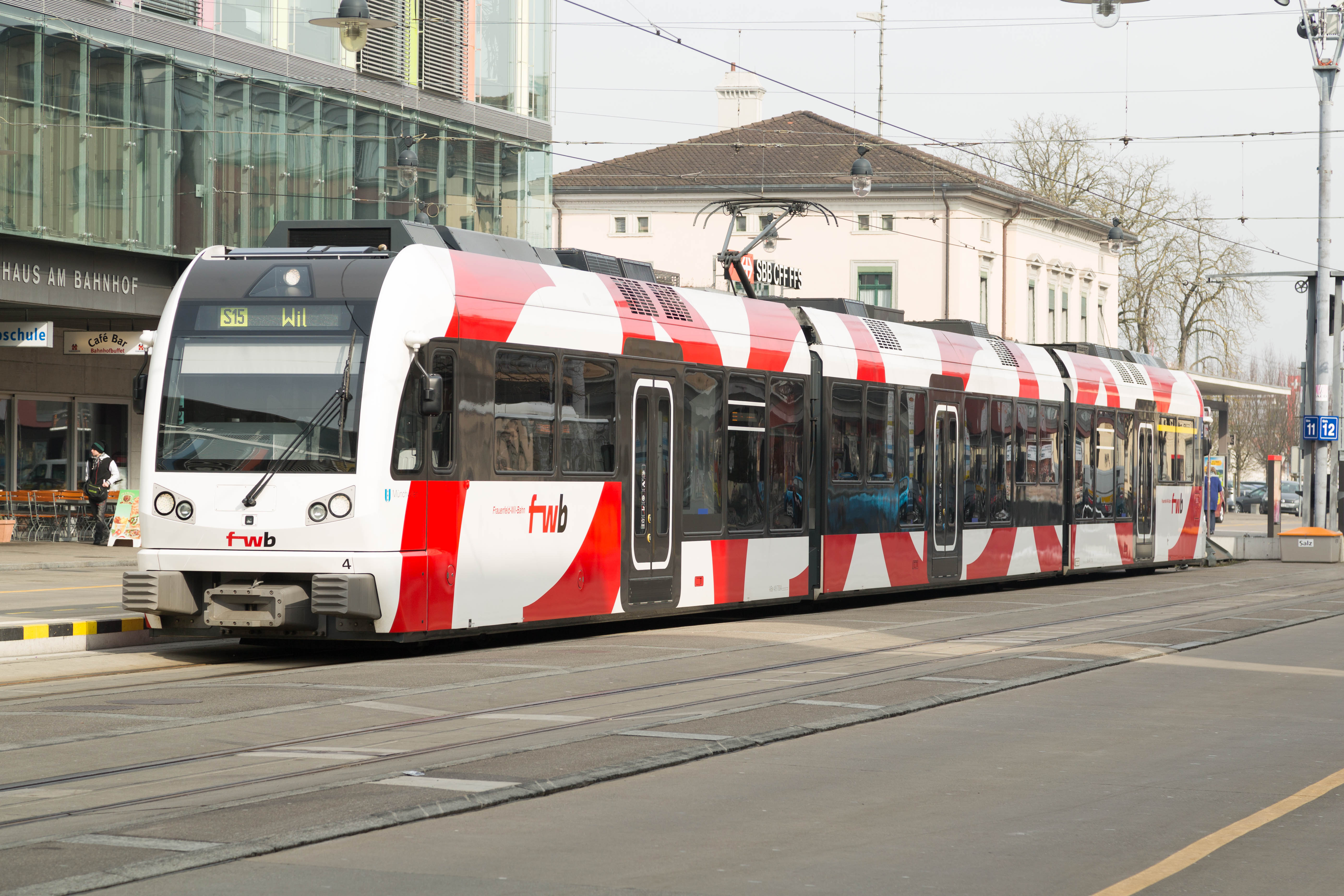 Stadler Gelenktriebzug ABe 4/8 Nummer 4 der Frauenfeld–Wil-Bahn (FW) auf dem Bahnhofplatz in Frauenfeld in der Schweiz.